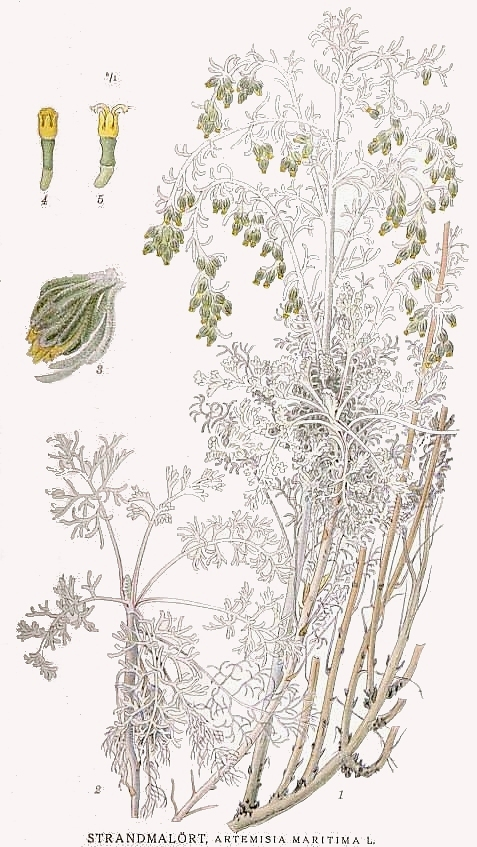 Original Description Strandmalört, Artemisia maritima L.